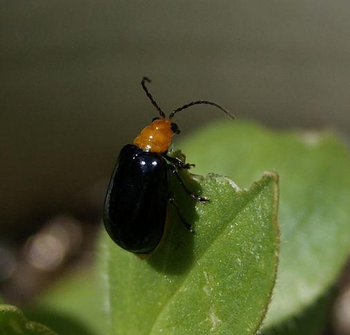 クロウリハムシ Kuro uri hamushi (Leaf Beetle)